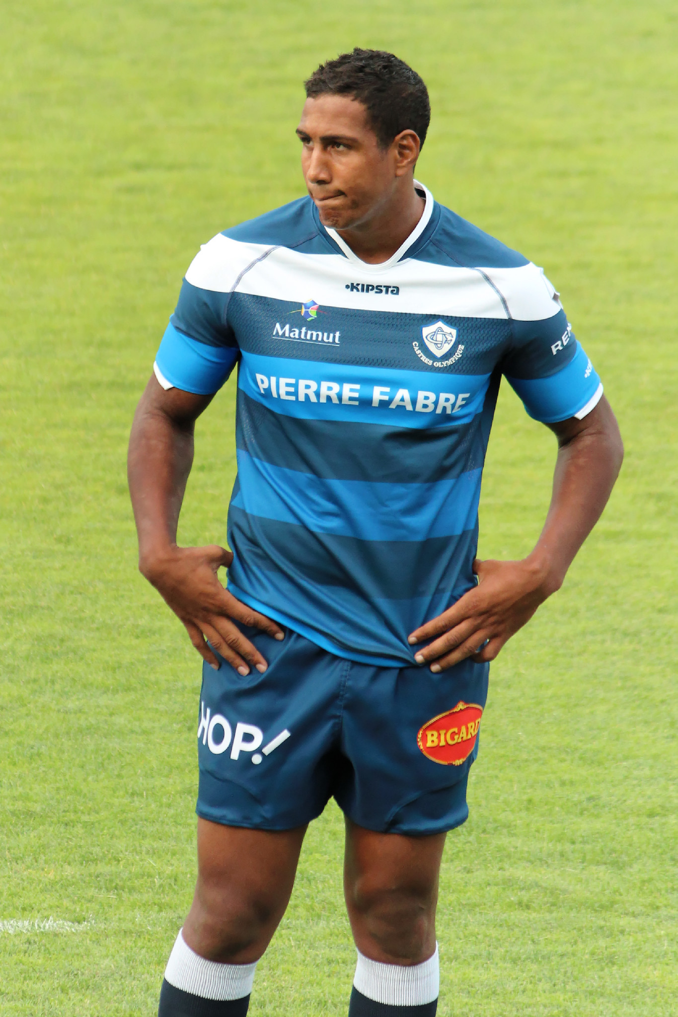 Joueurs du Castres Olympique lors de la présentation de l'équipe pour la saison 2015-2016